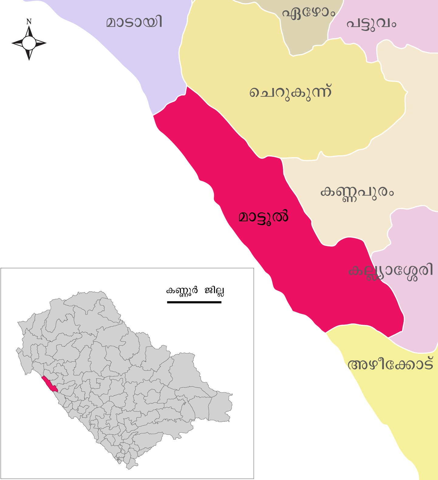 കണ്ണൂർ ജില്ല